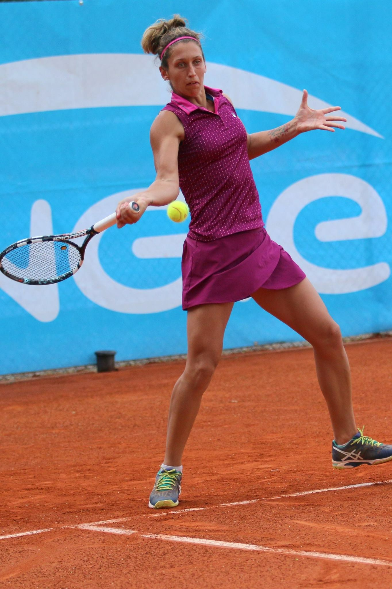 Alice Savoretti, tennista